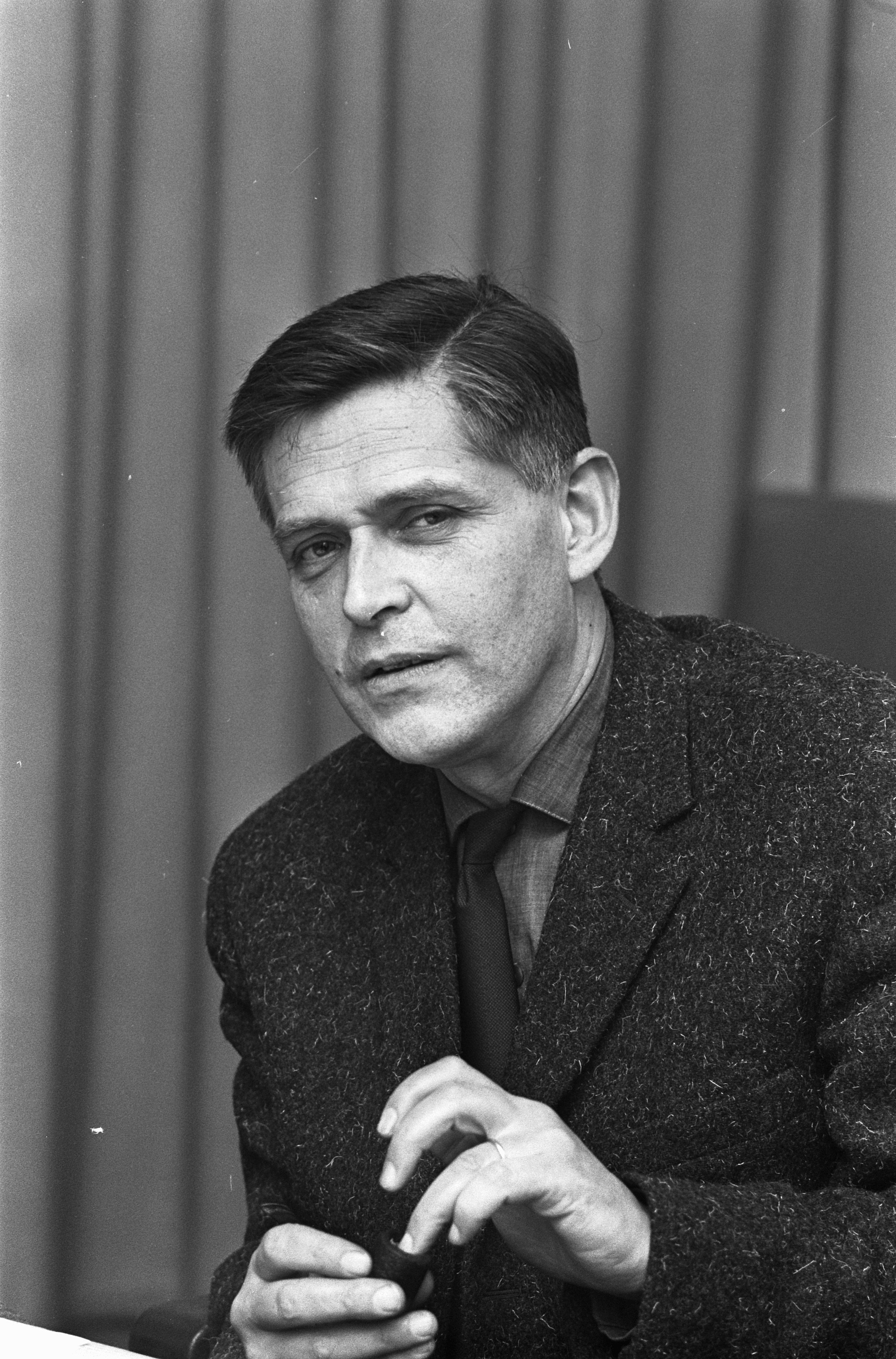 Beeldhouwer, monumentenbeschermer en KVP-gemeenteraadslid (Amsterdam) Geurt Brinkgreve